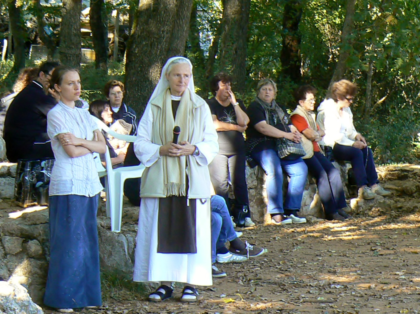 Suor Emmanuel durante una sua meditazione davanti a pellegrini italiani e ungheresi. Alla sua sinistra la traduttice dall'italiano all'ungherese.